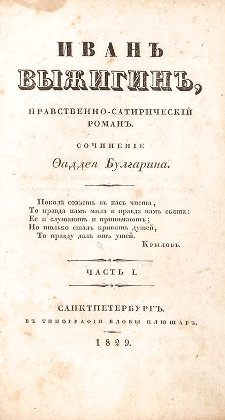 Иван Выжигин, 1829